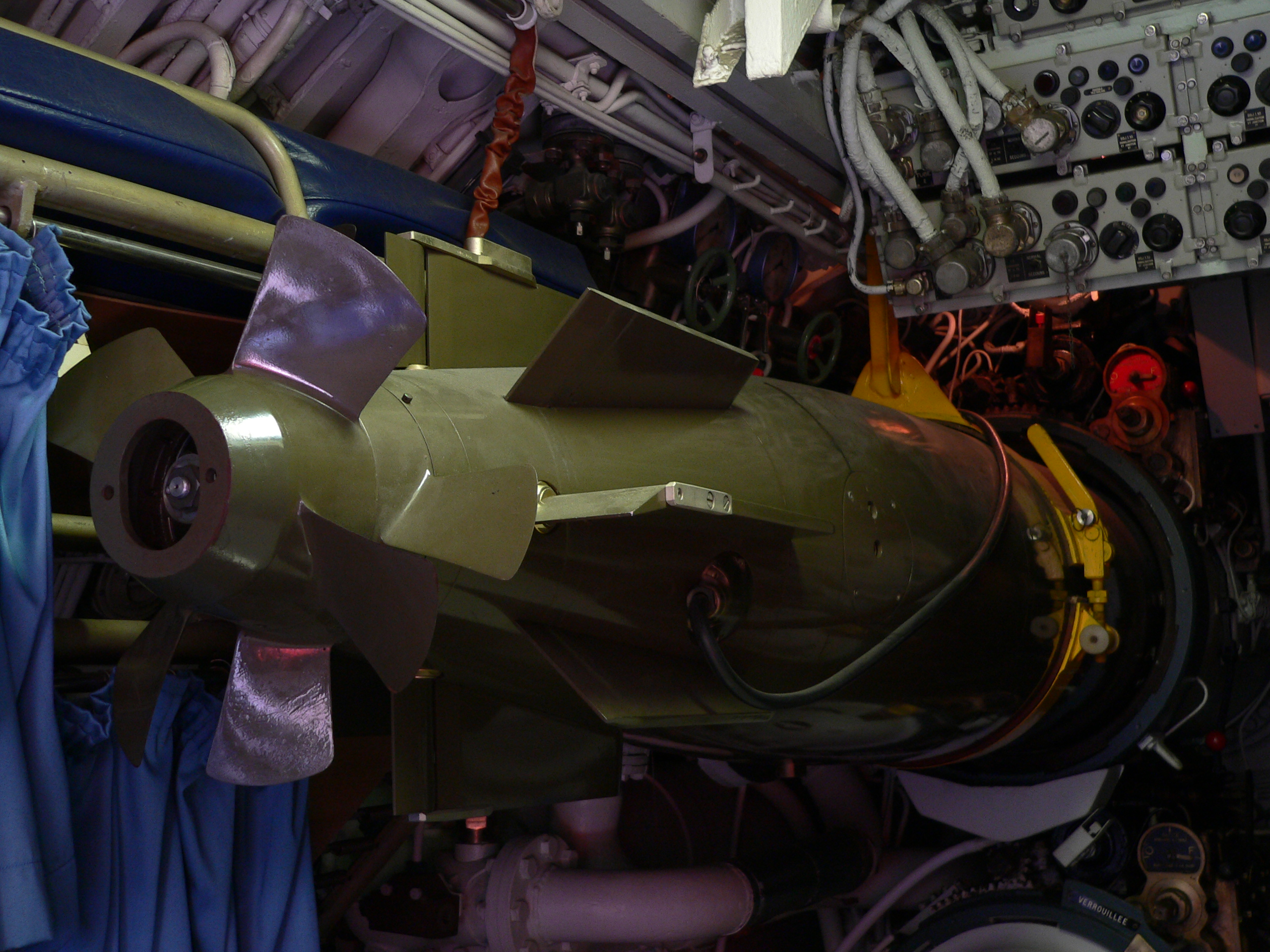 Argonaute